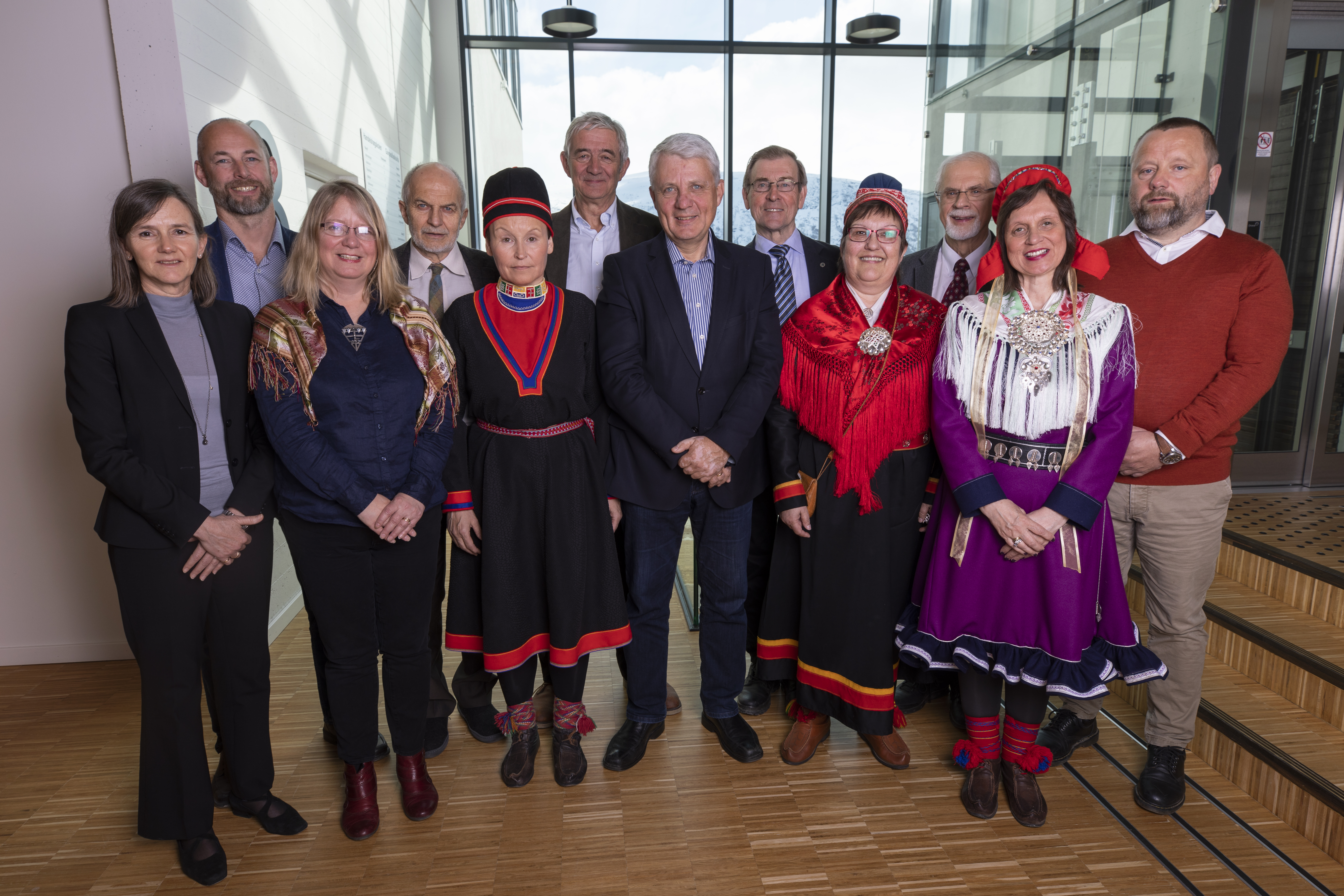 Bilde av kommisjonen. Bildet er tatt på UiT Norges arktiske universitet, i Tromsø våren 2019. Bildet er tatt av fotograf David Jensen.